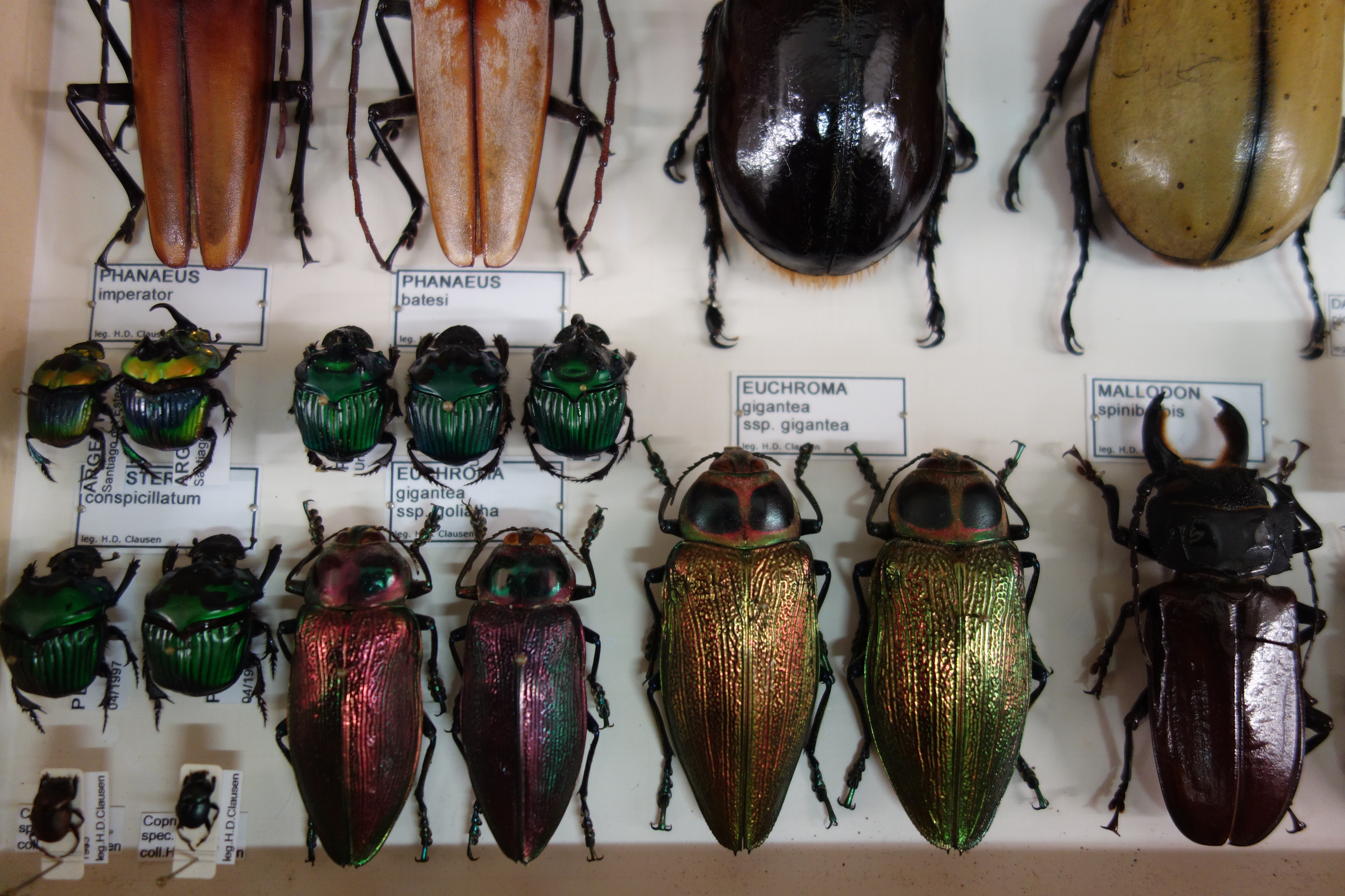 Käfer aus der entomologischen Sammlung des Centrums für Naturkunde